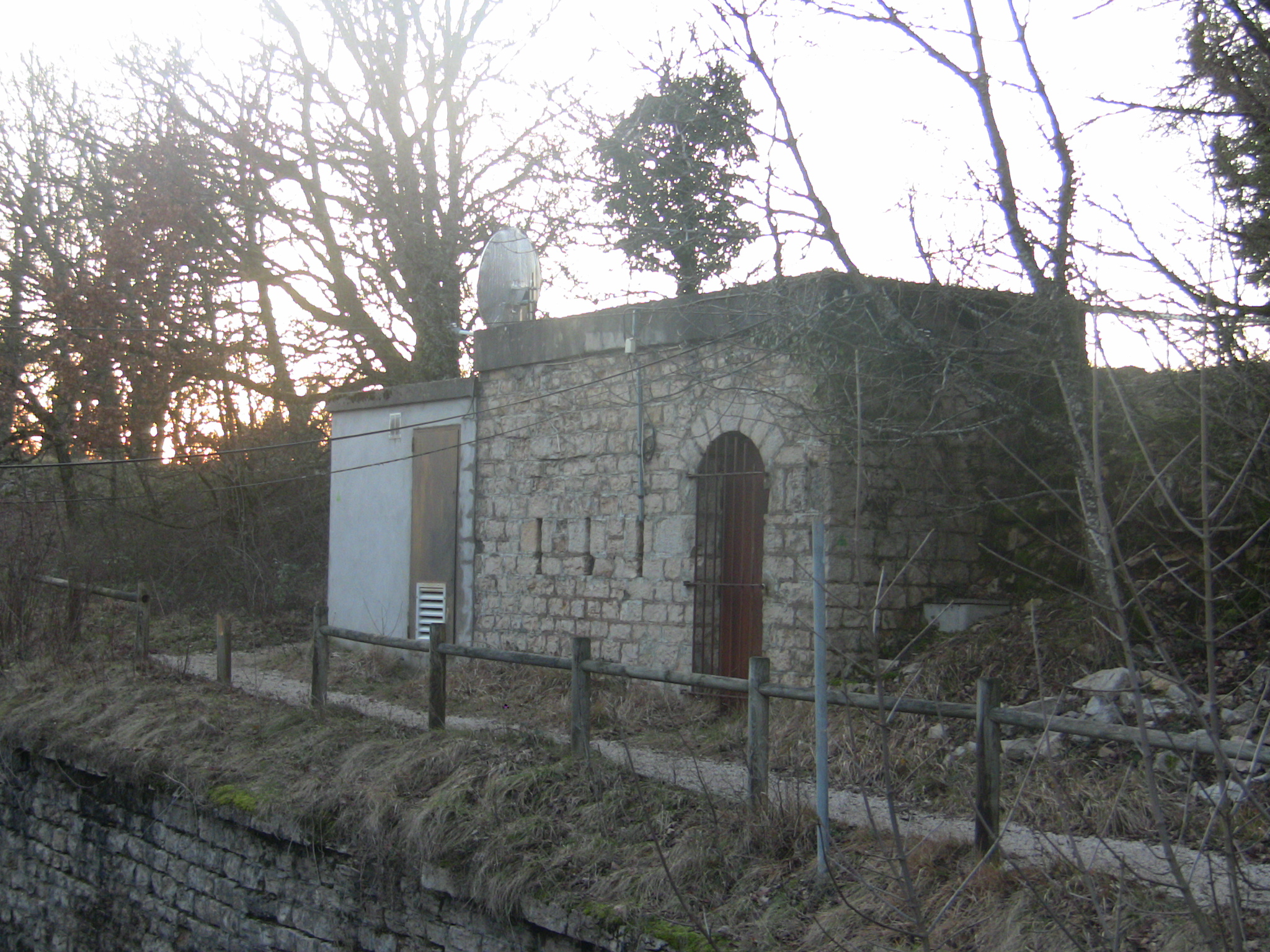 La petite batterie du front nord du fort de Planoise, à Besançon (Doubs, France).